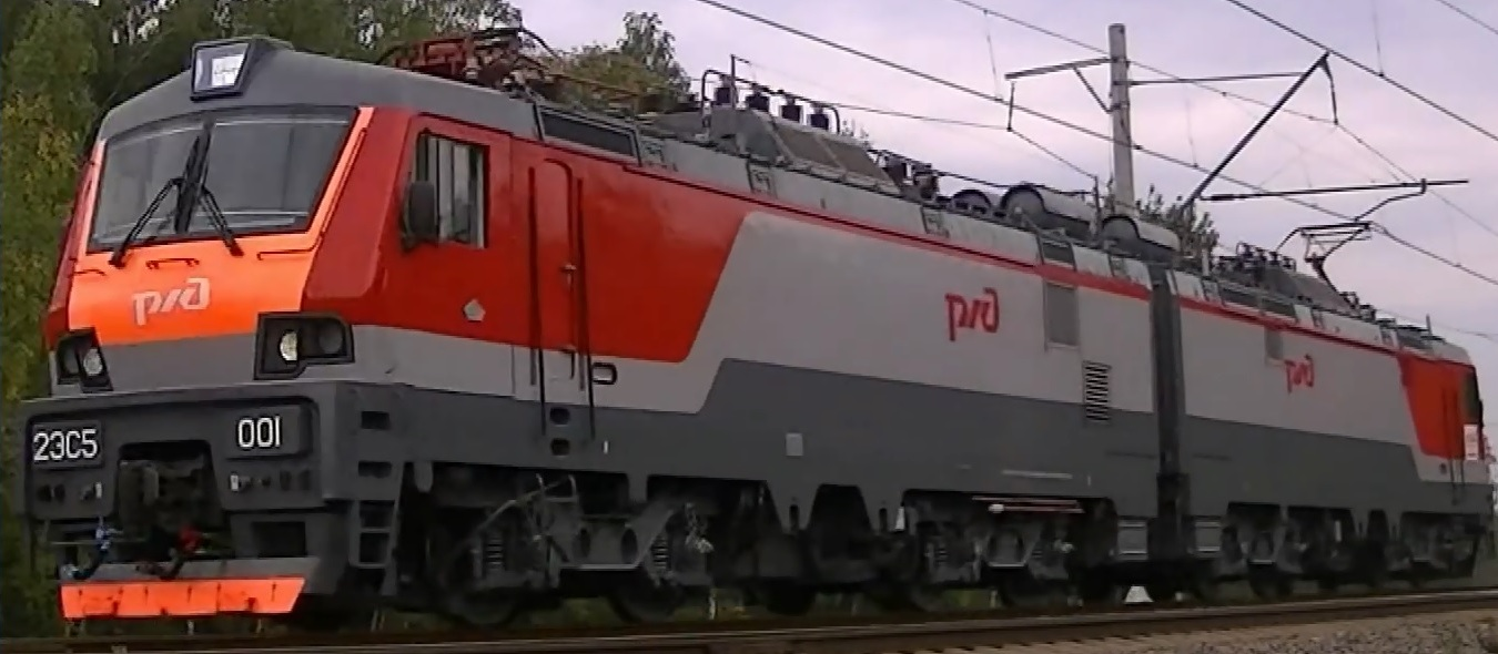 Электровоз 2ЭС5-001 на экспозиции в Щербинке